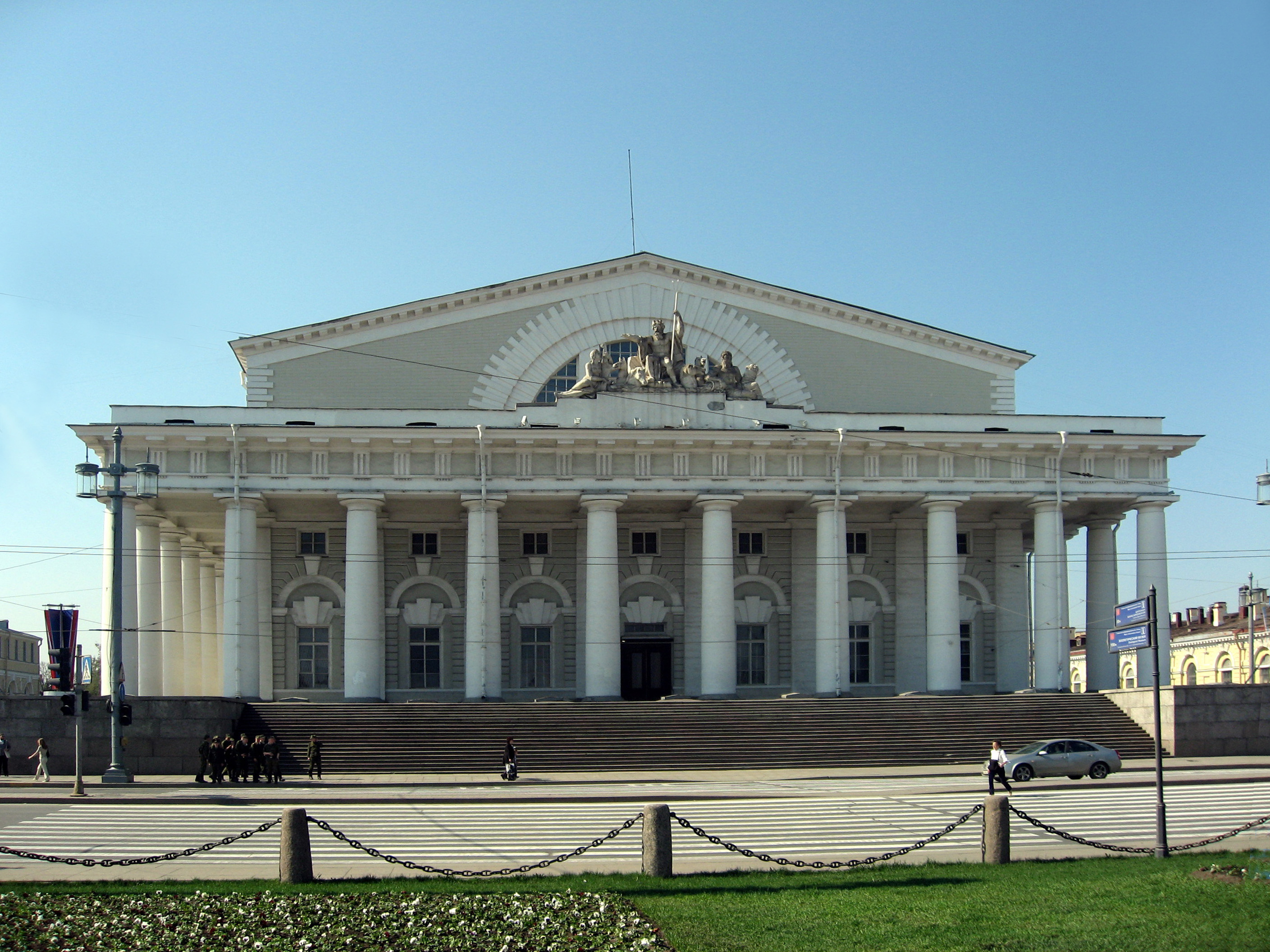 Sankt-Petěrburg